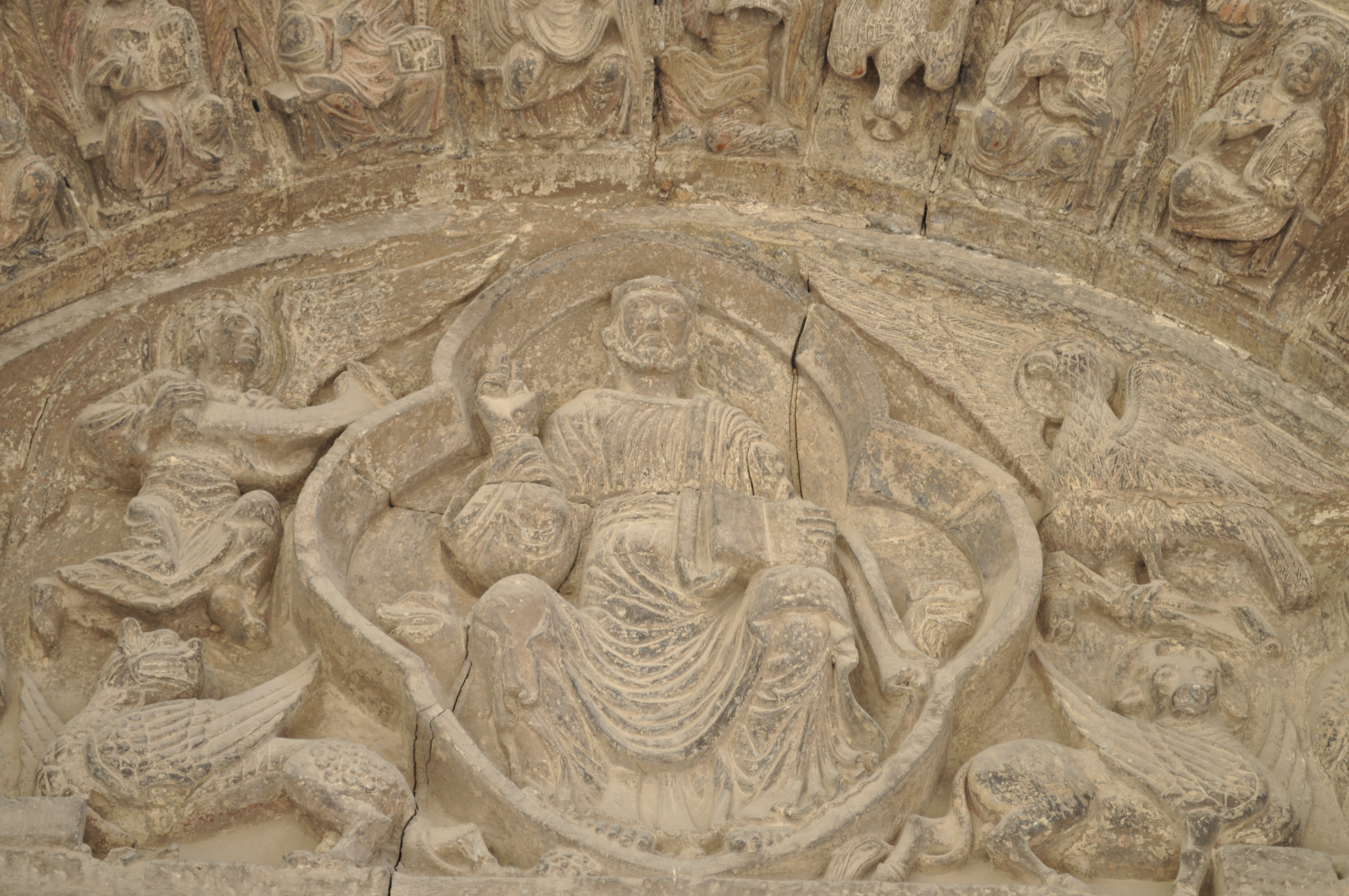 Pantocrator Santa Maria Magdalena